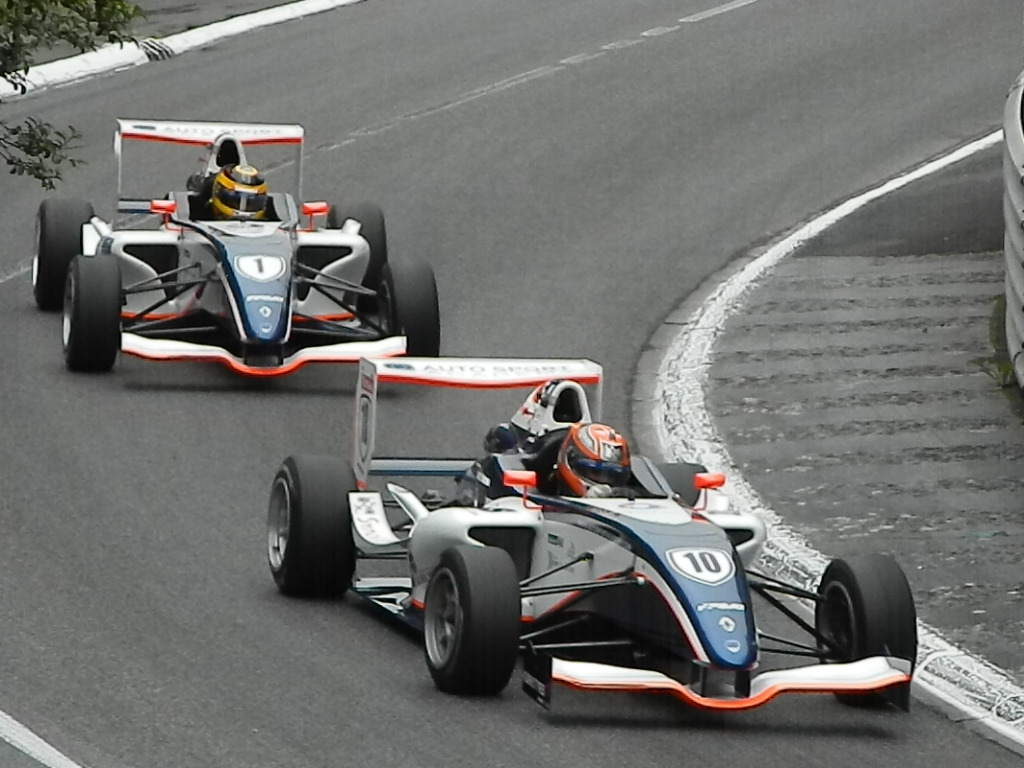 Nicolas Jamin (10) et Darius Oskoui (1) sur Formule 4 lors du Grand Prix de Pau 2012.